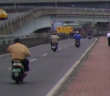 台北橋機車專用道。